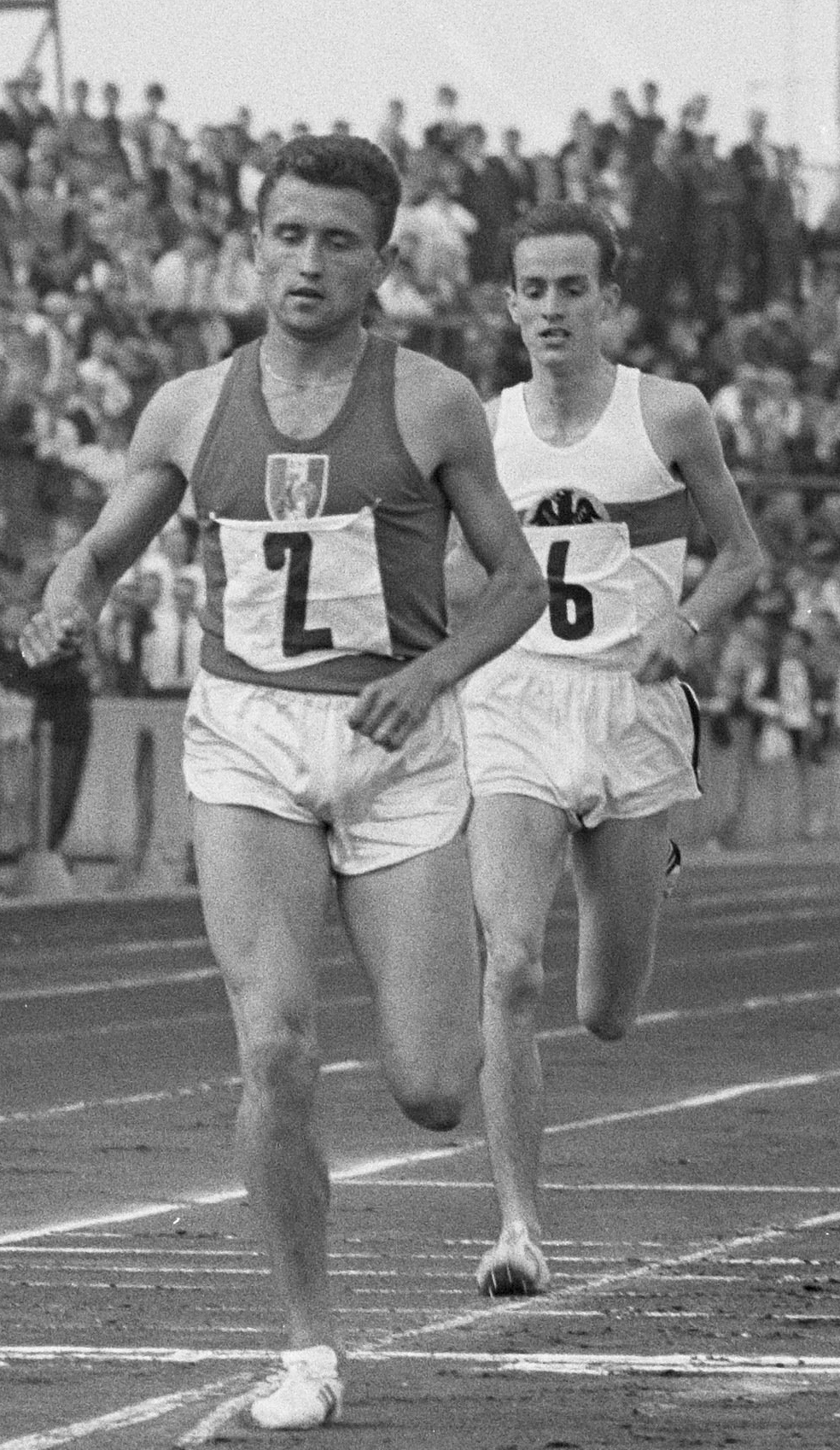 Zes Landen Atletiek in Enschede. Finish 1500m in volgorde de nummers 1, 2 en 3 M. Jazy , H. Norpoth (Duitsland) en H. Snepvangers